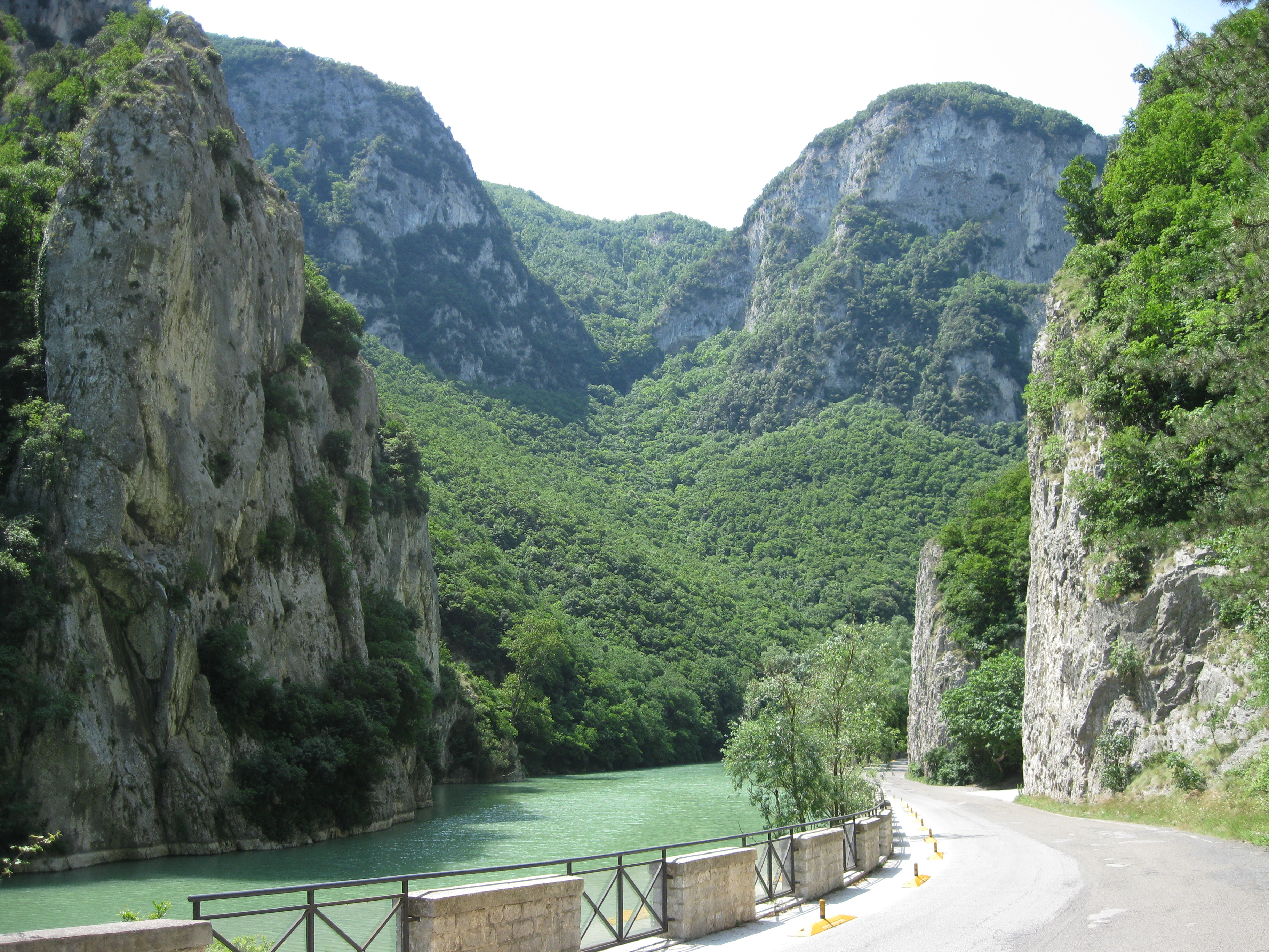 Gola del Furlo, Marche, Italien